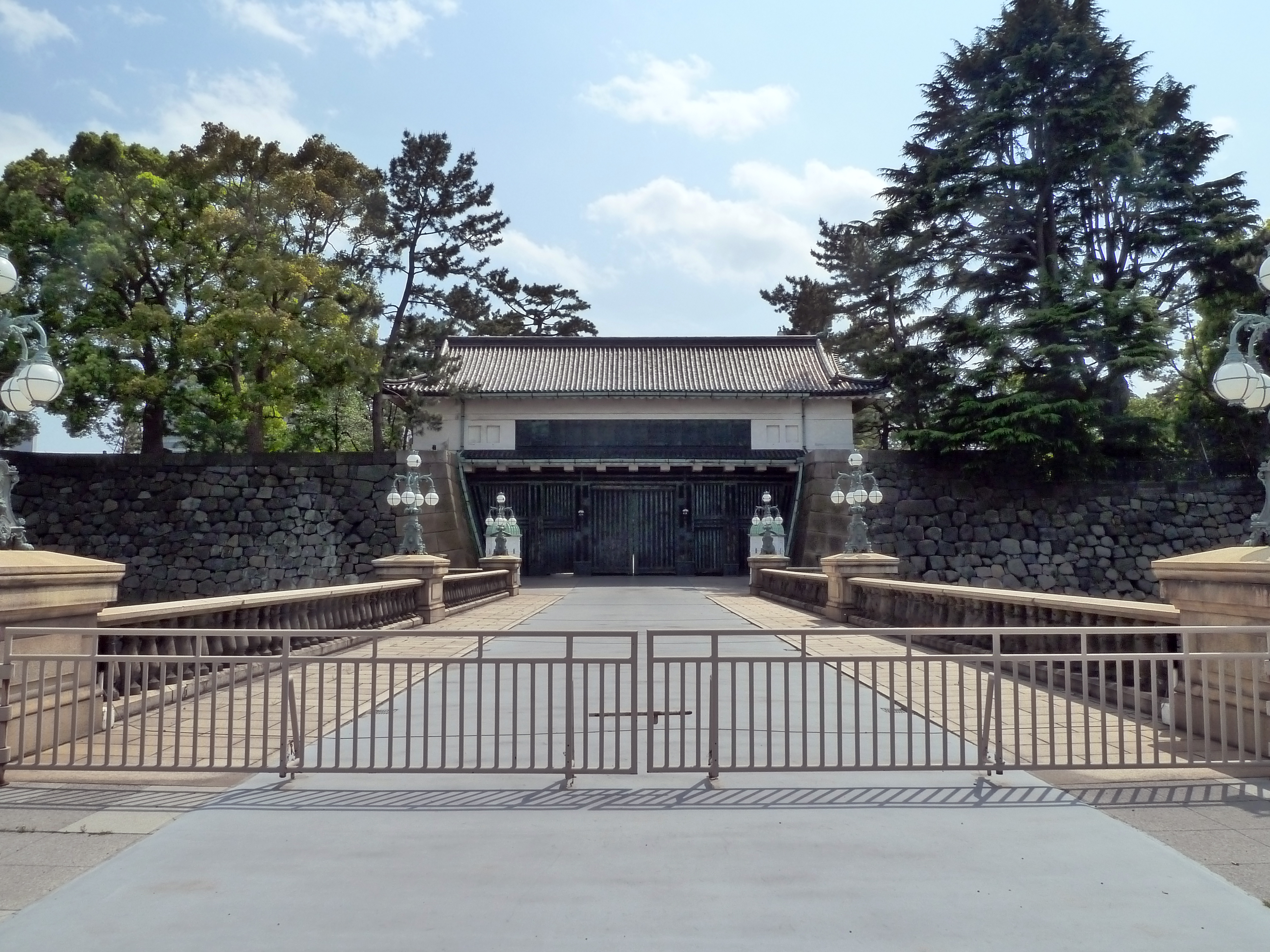 Imperial Palace